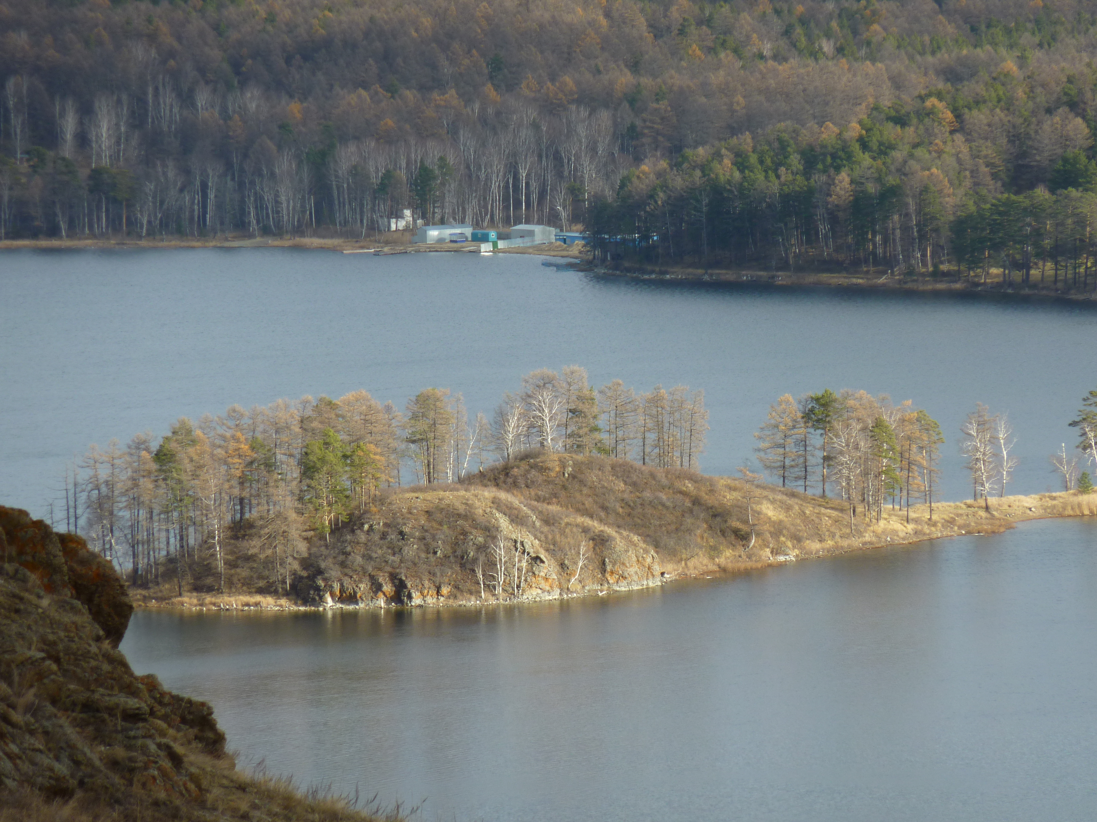 Вид на полуостров